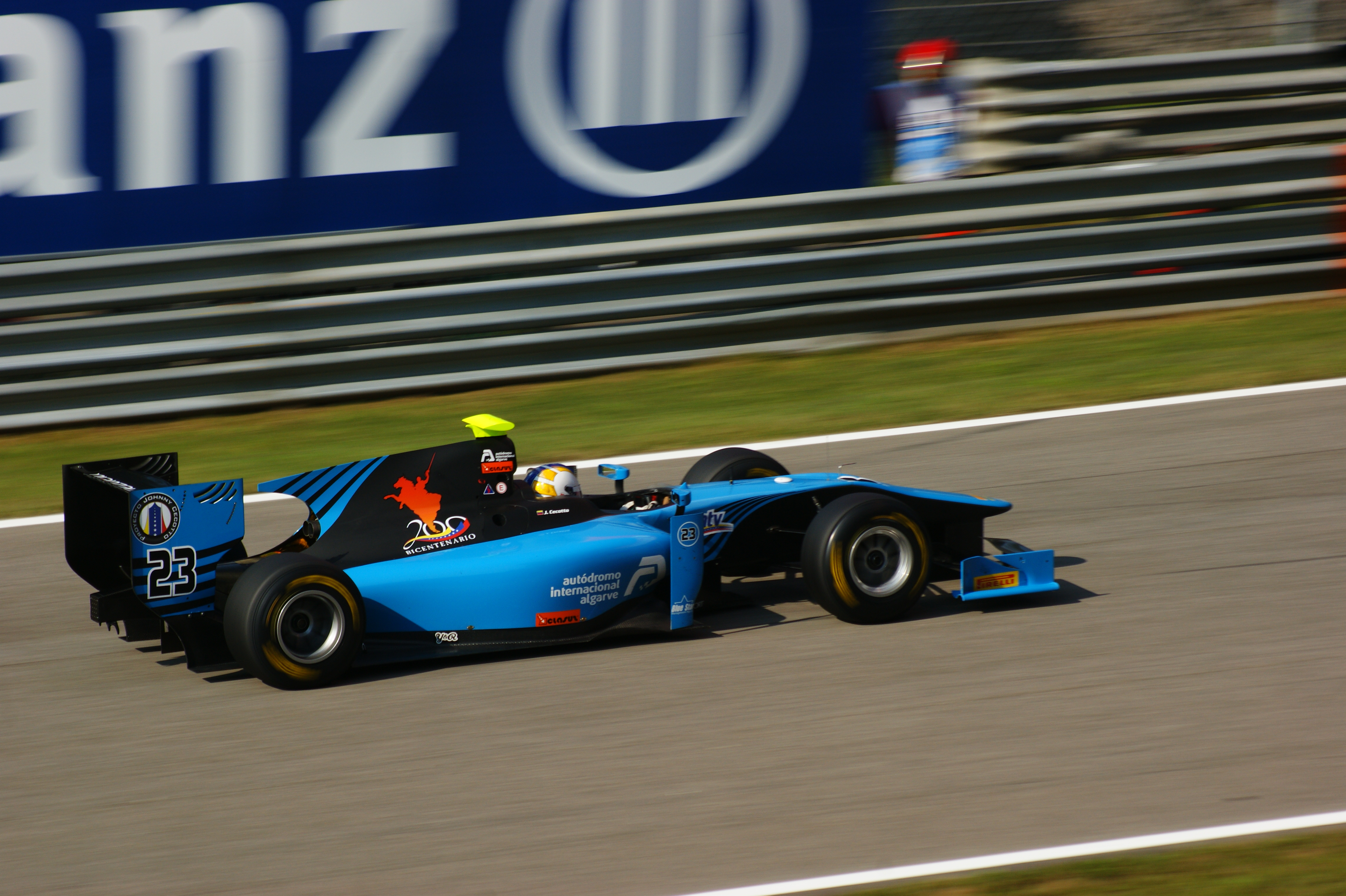 Johnny Cecotto alla variante della roggia Monza 2011